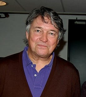 Ron Brandsteder bij Radio Westerwolde